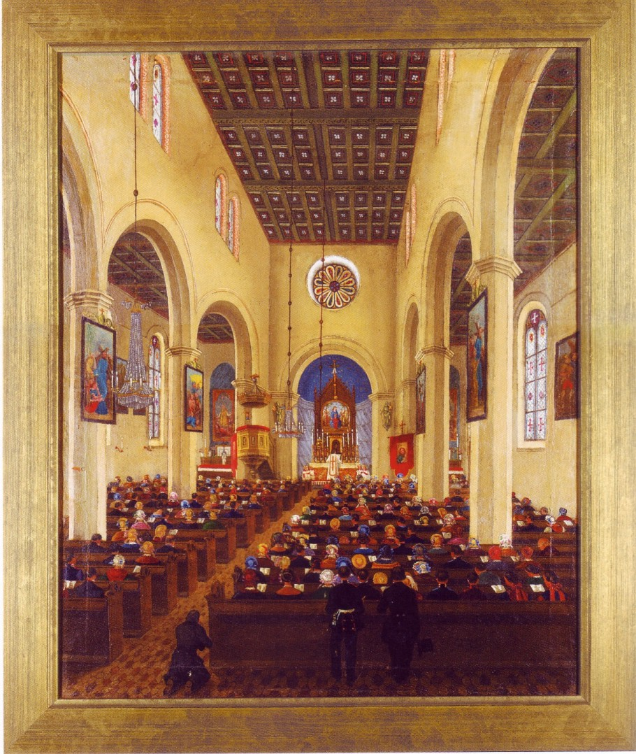 Kirche St. Marien am Behnitz in Berlin-Spandau. Innenansicht. Maler: anonym.